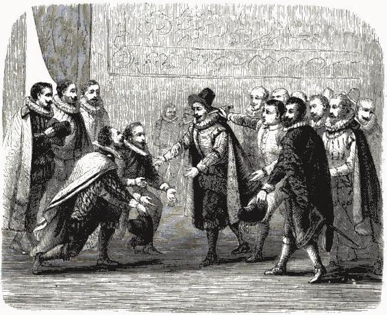 "Attentat de Jean Chastel, d'après une gravure du temps."